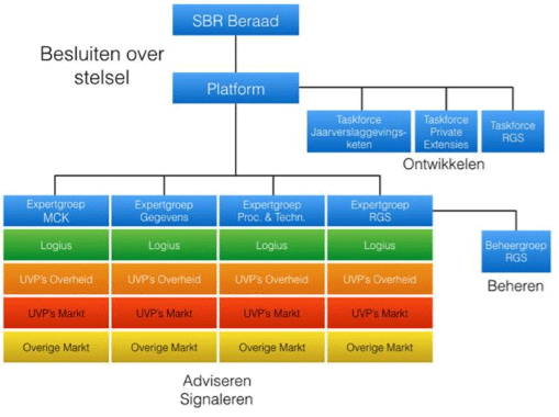 Schematisch overzicht van de SBR Governance